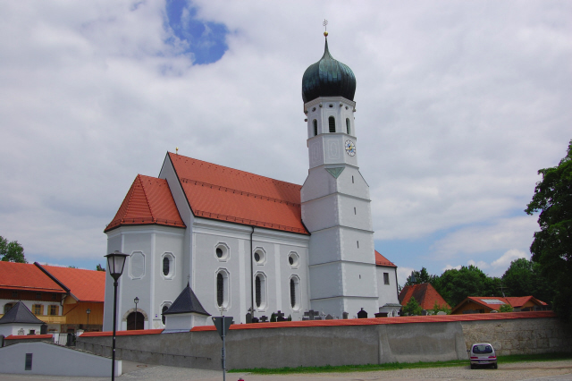 Kleinhelfendorf: Pfarrkirche St. Emmeram